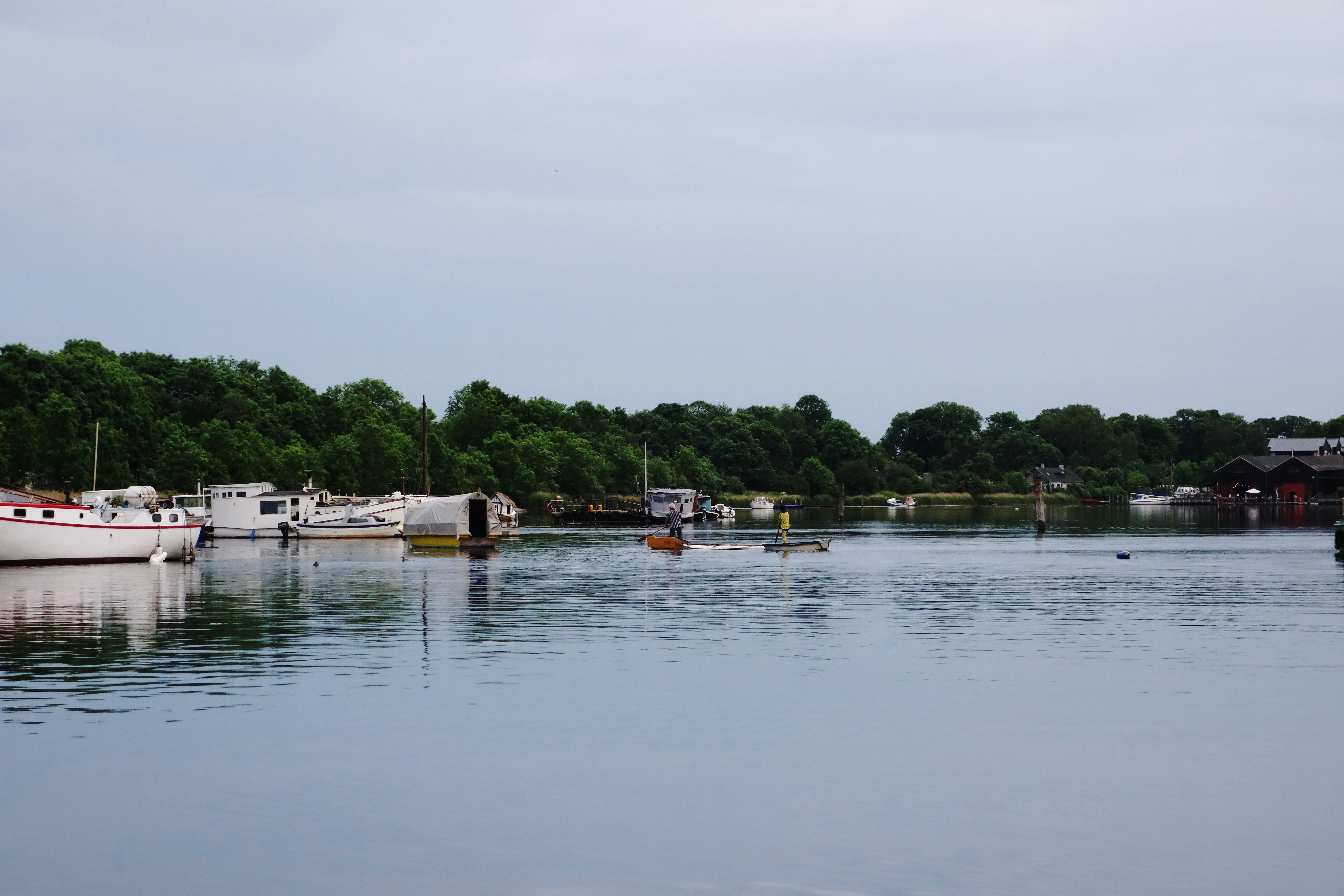 Fredens Havn